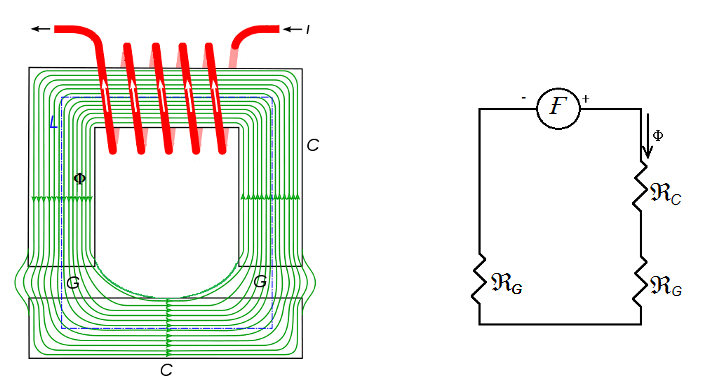 A diagram of the magnetic field (green) of a typical electromagnet. The drawing shows a section through the core of the electromagnet except for the windings (red), which are shown in three dimensions for clarity. The iron core of the electromagnet (C) forms a closed loop for the magnetic flux, with two air gaps (G) in it. All of the magnetic field (B) is confined to the core circuit. The blue line L is the average length of the flux path or magnetic circuit, and is used to calculate the magnetic field. This is a freehand drawing and is not quantitatively accurate as are images of magnetic field lines produced by computer. Equivalent circuit shown to the right. Drawing based on Chetvorno original work: Electromagnet with gap.svg